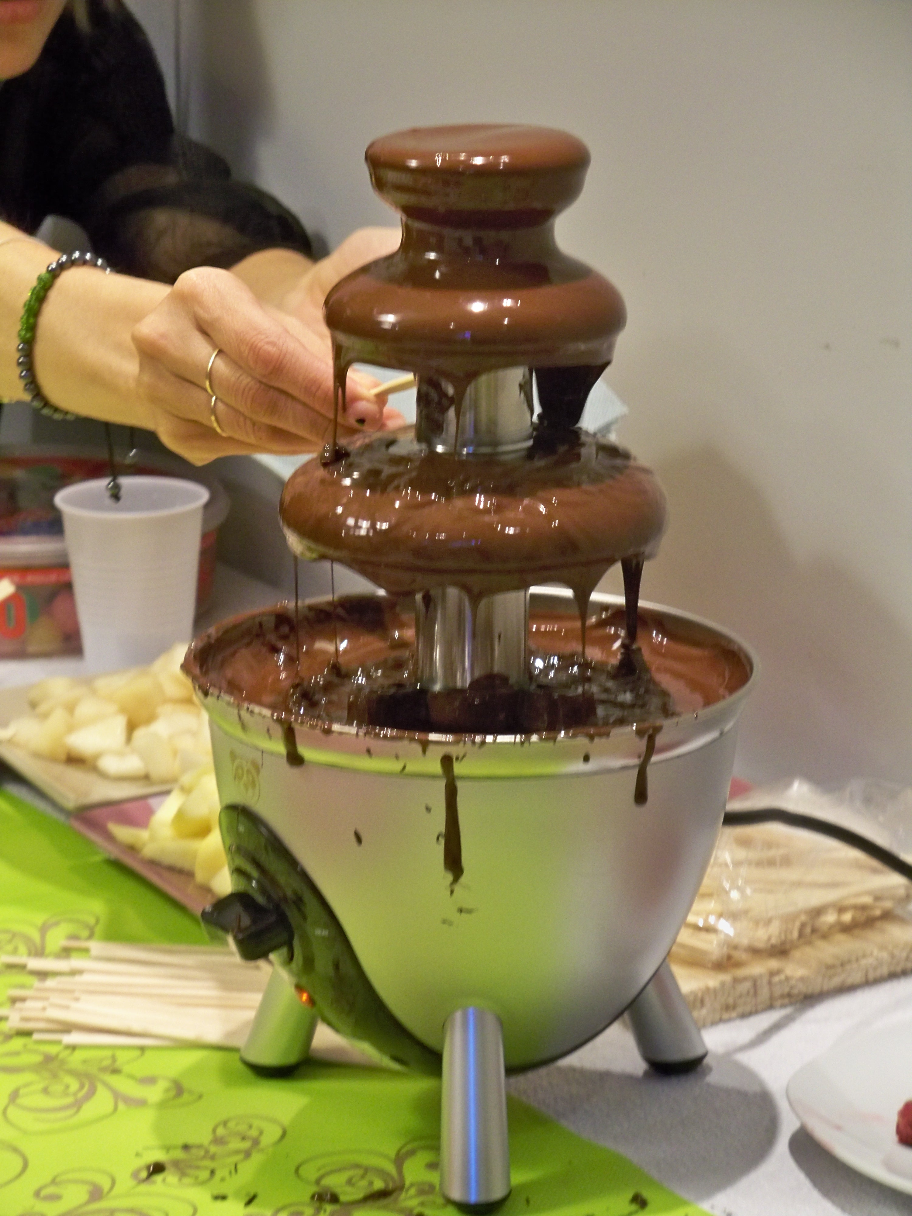 Fontaine à Chocolat